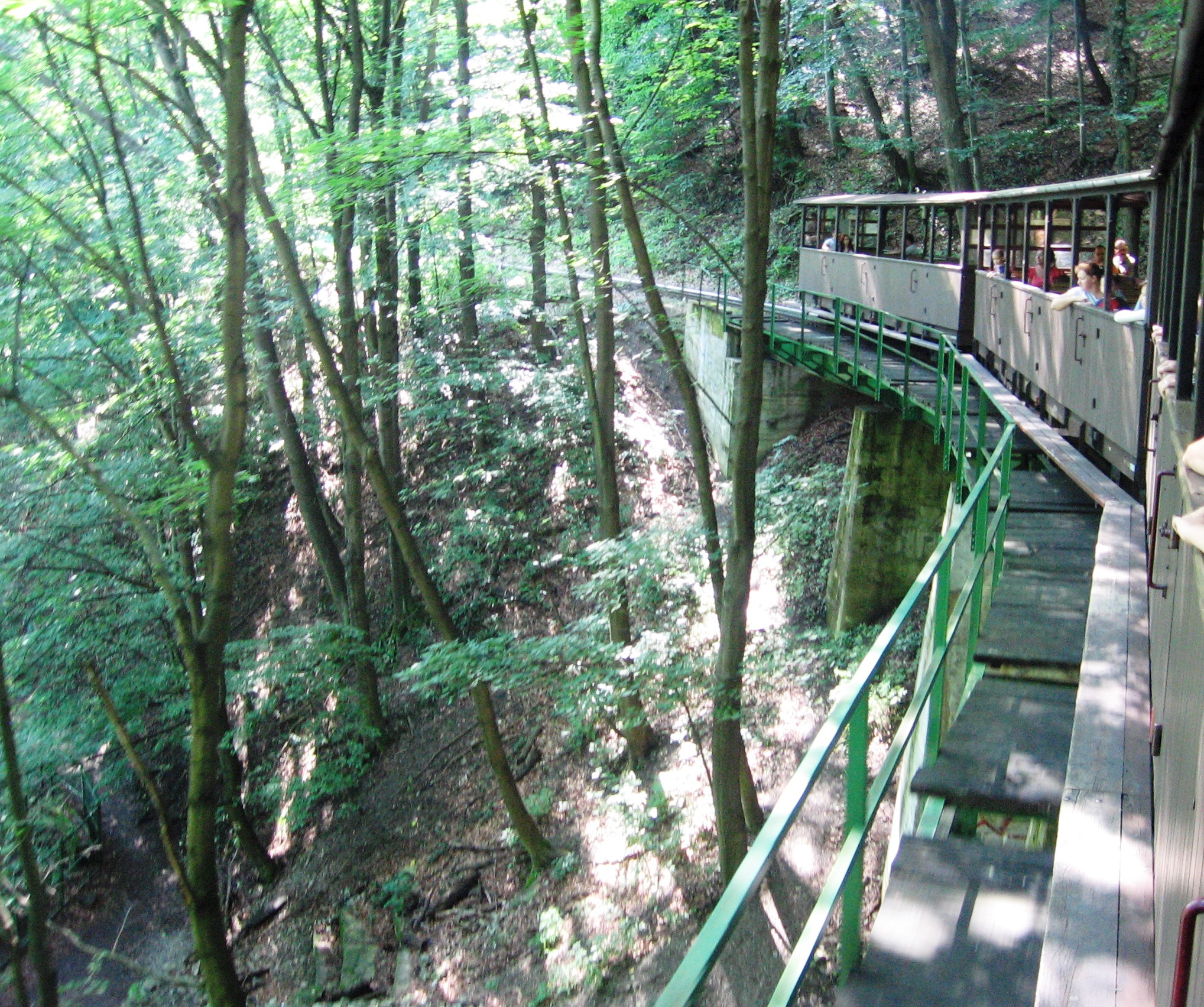 Áthaladás a Görbe hídon (ívhídon).